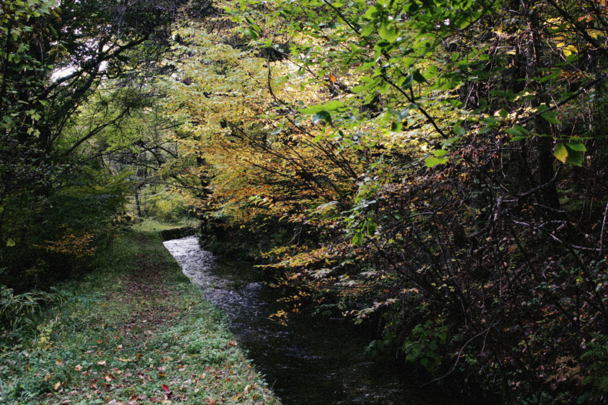 茅野市北山中山地籍における滝之湯堰